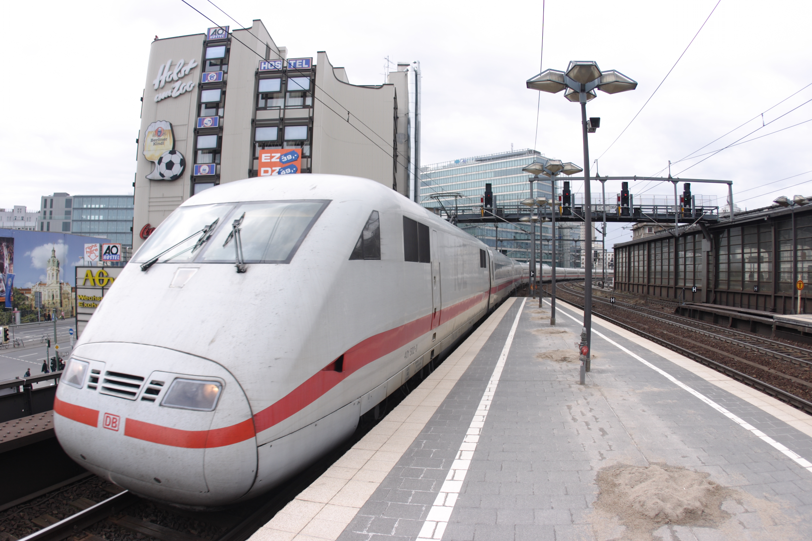 ICE bei der Einfahrt in den Berliner Bahnhof Zoo. Aufgenommen mit einem Fischauge auf einer Canon EOS 10D